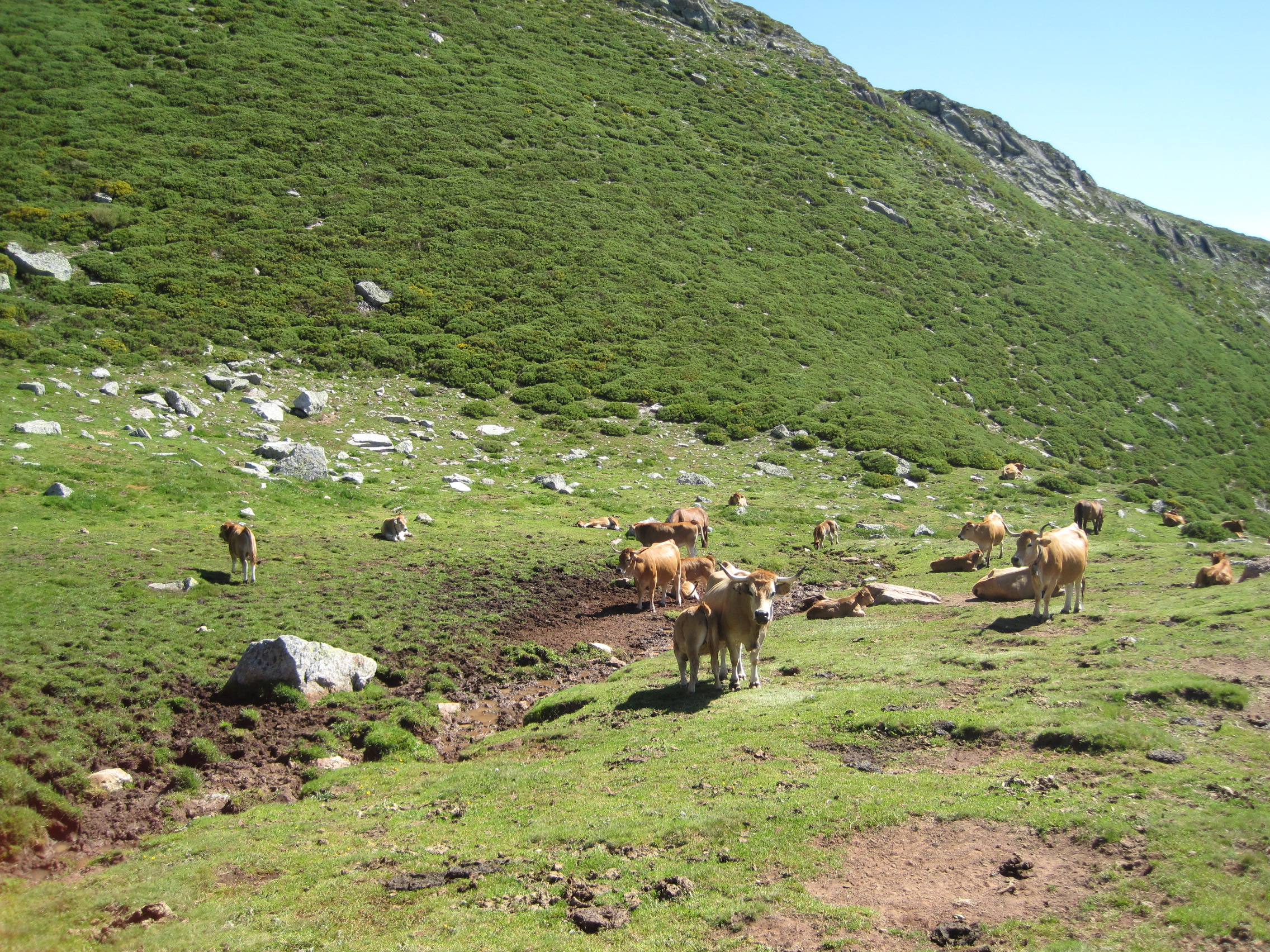 Sestil para el ganado en la subida al pico Valdecebollas, en Palencia (España).